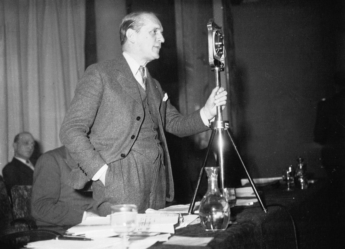 1er Congrès du Parti social français : le colonel de La Rocque au micro : [photographie de presse] / Agence Meurisse